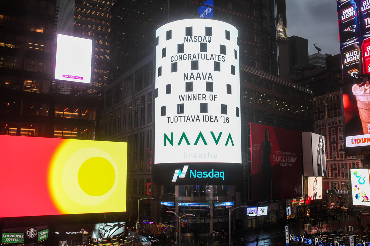 New Yorkin Times square aukio